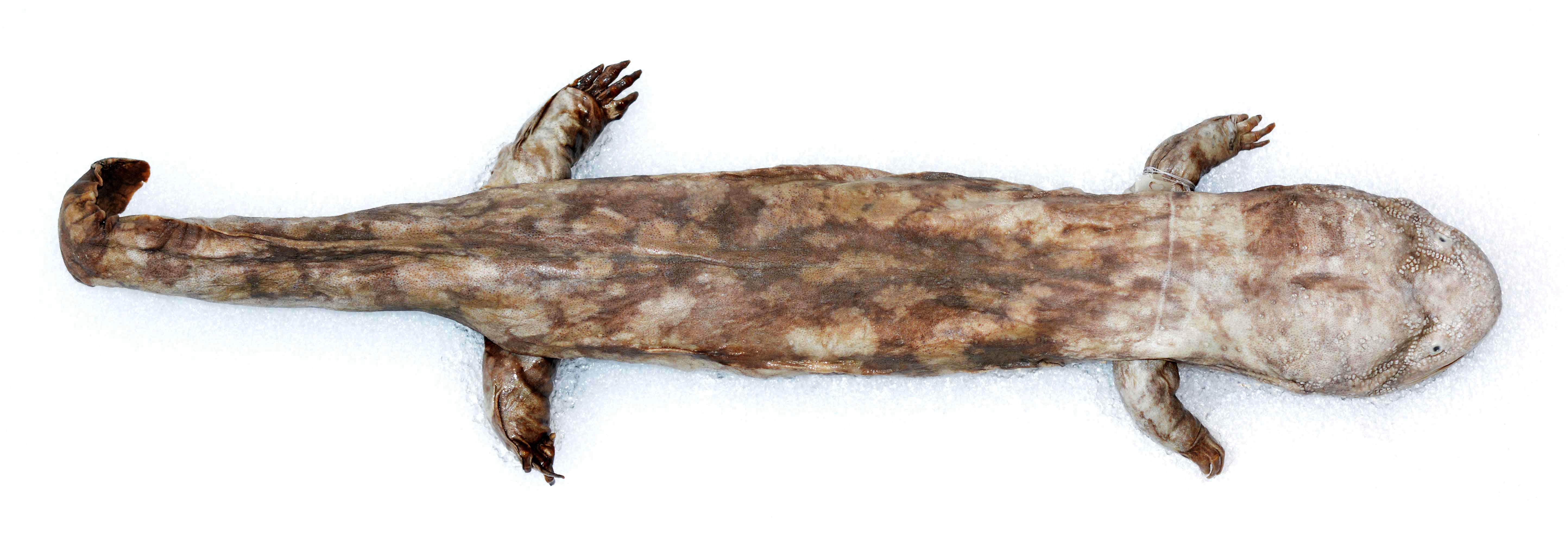 D'autres salamandres géantes seront collectées par le père David lors de sa troisième exploration, au Shaanxi.